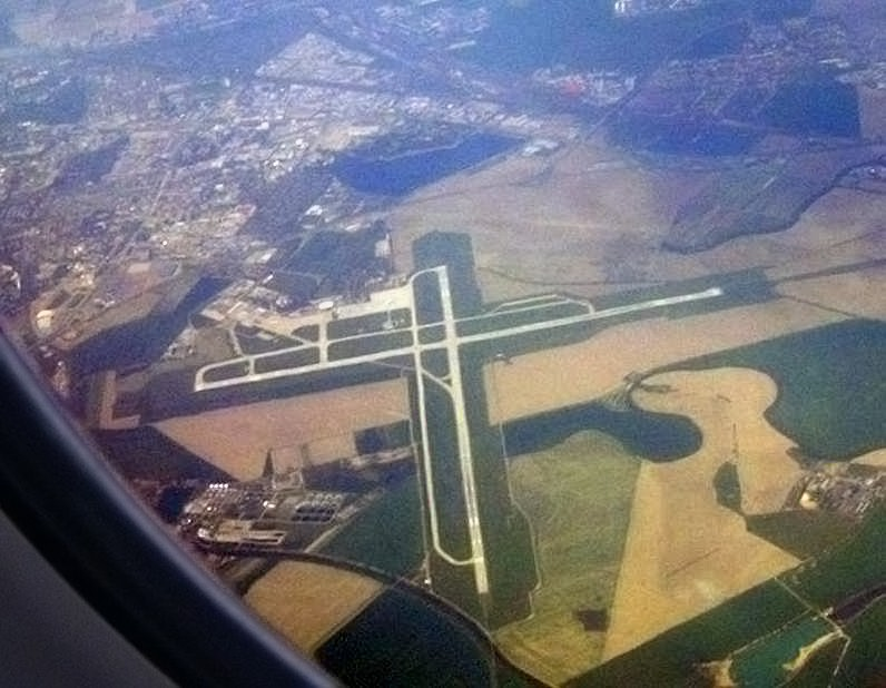 Bratislava Airport Quelle: RON-DEL Datum: 18.12.2003 Lizenz